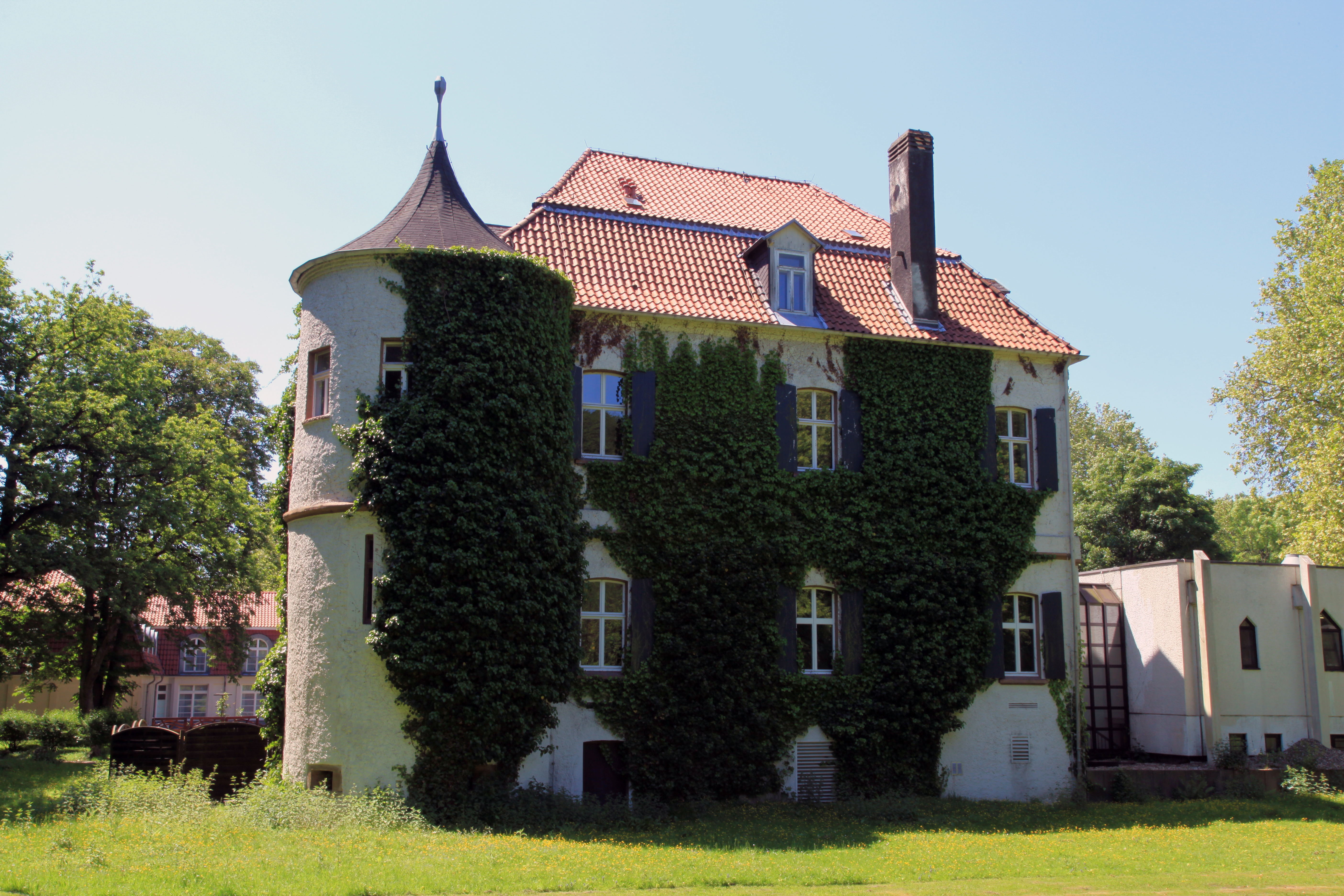 Haus Goldschmieding, jetzt Teil des Arcadia Hotels Goldschmieding, Dortmunder Straße 55 in Castrop-Rauxel